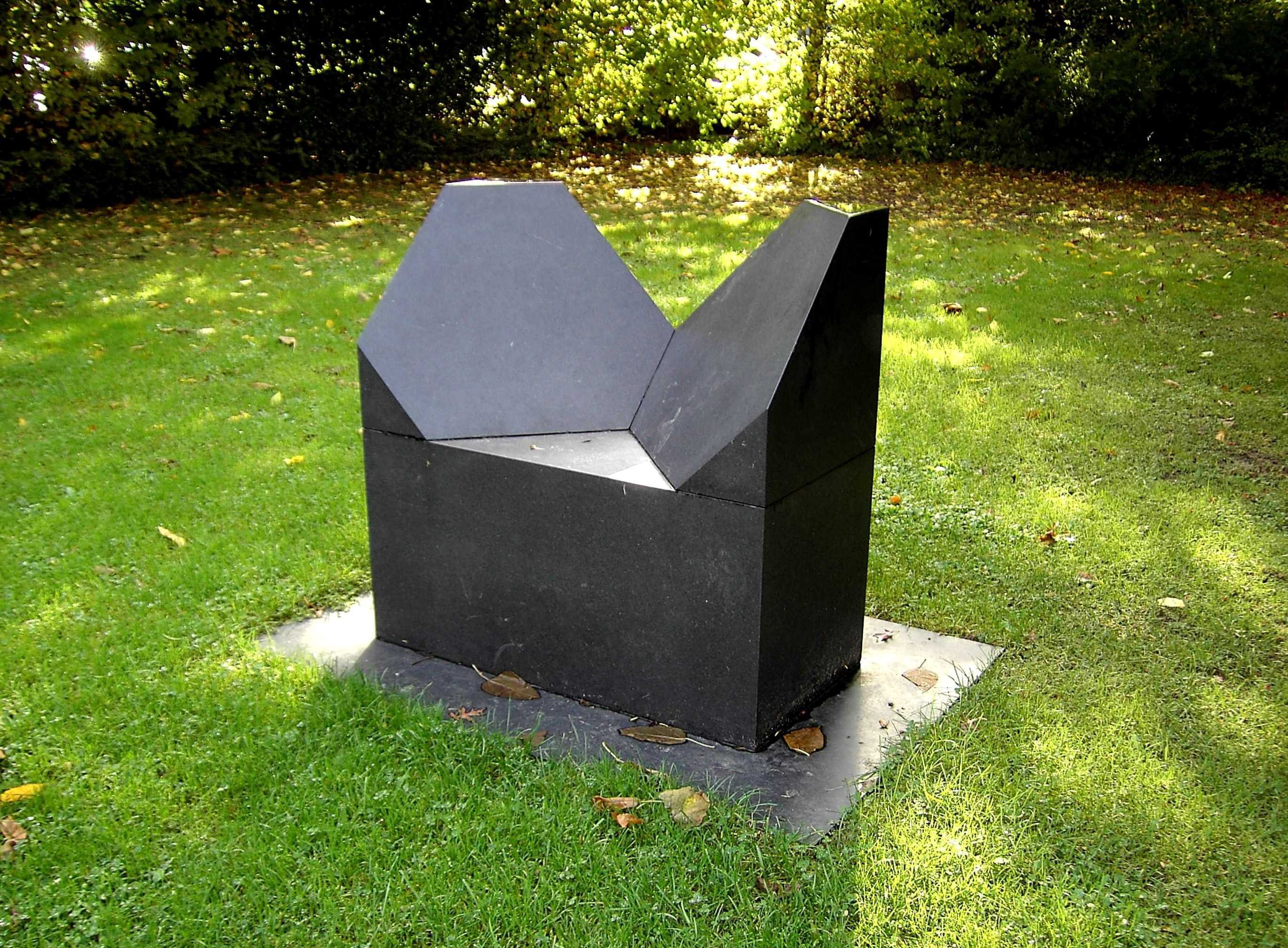 Erwin Heerich, o.T., Meebusch-Osterath